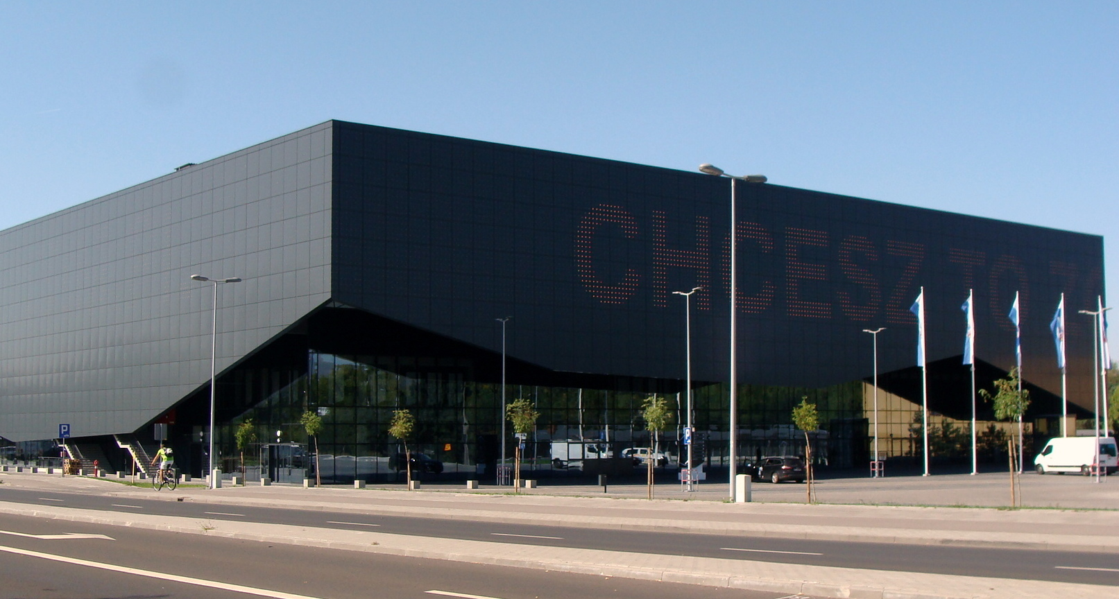 Hala sportowo-widowiskowa w Toruniu